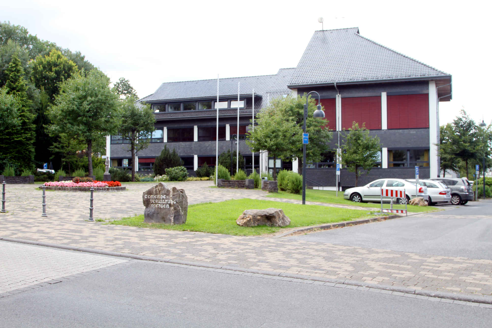 Gemeindeverwaltung Roetgen